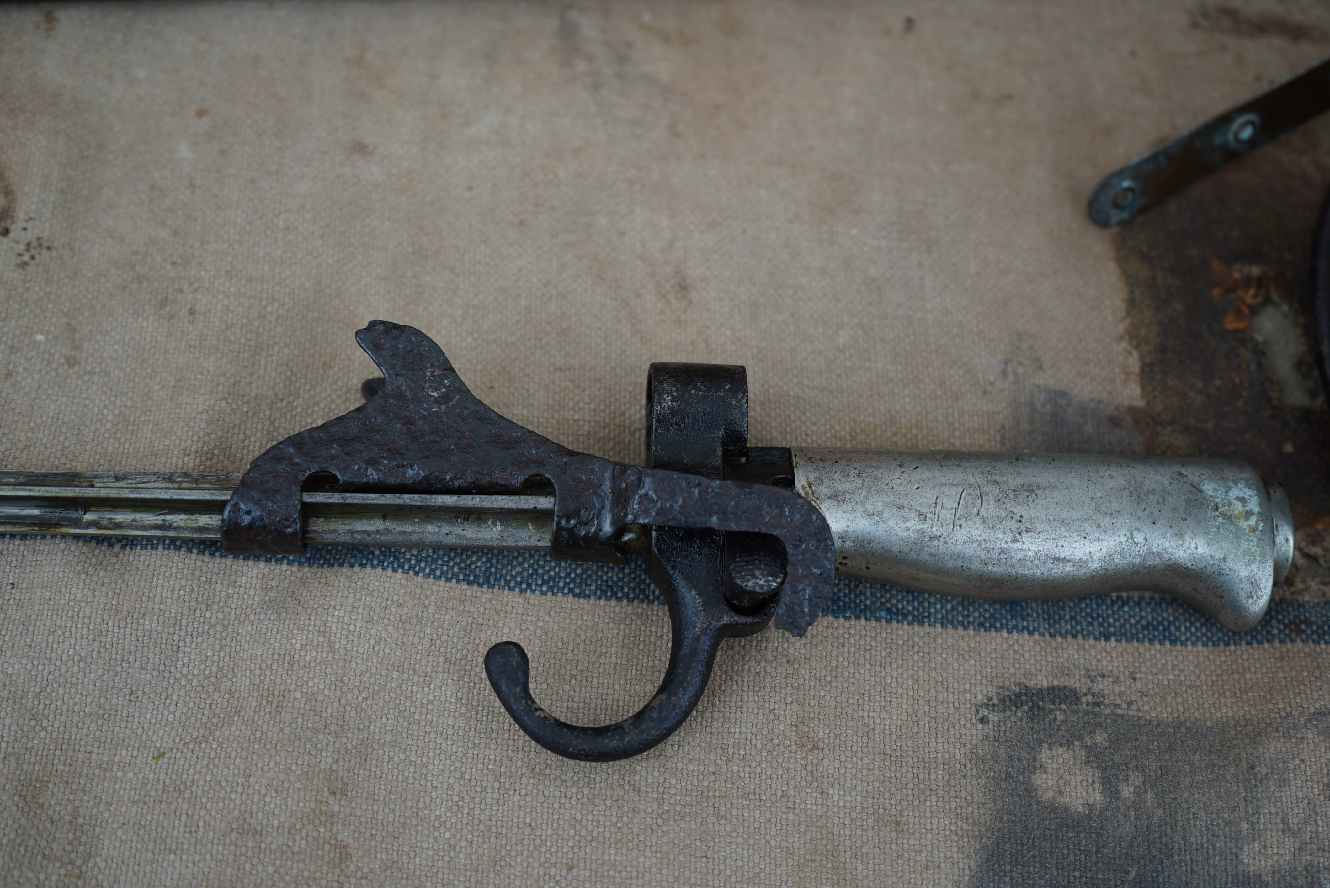 baionette française de la première guerre mondiale avec son adaptateur coupe barbelés. Le barbelé bloqué par la partie mobile est cooupé par le tir d'une balle.